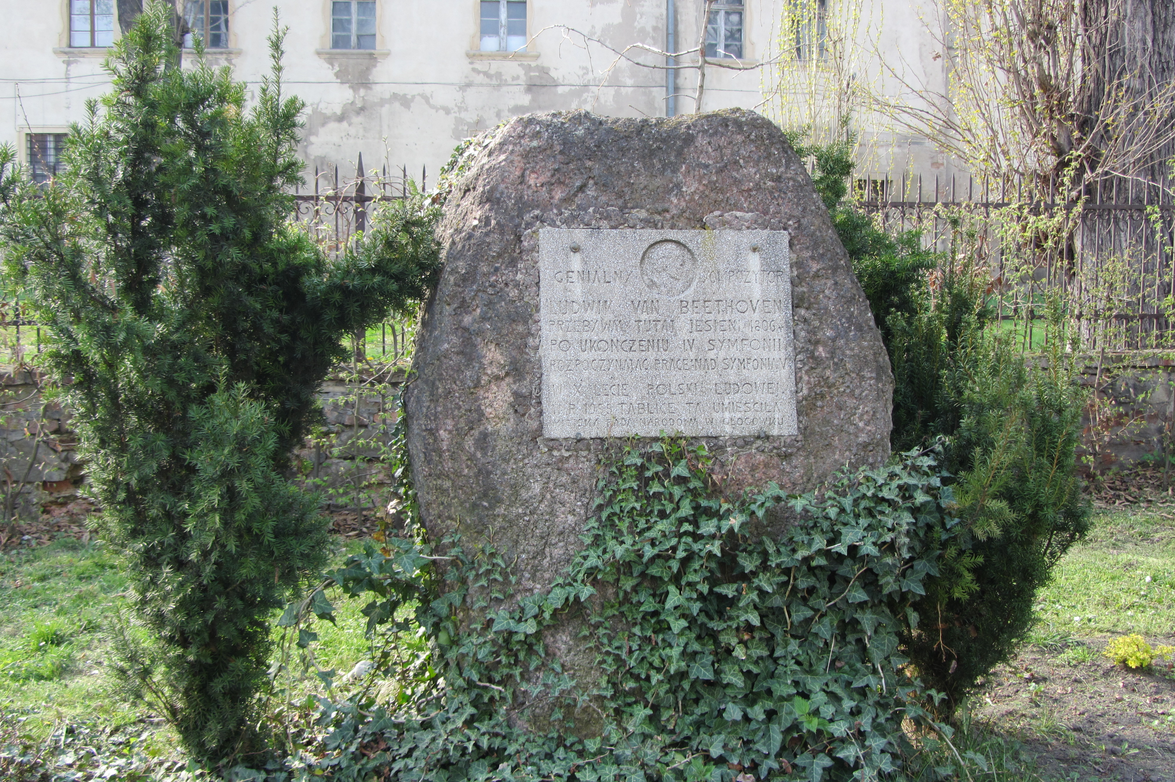 Denkmal für Ludiwg van Beethoven in Głogówek (dt. Oberglogau)